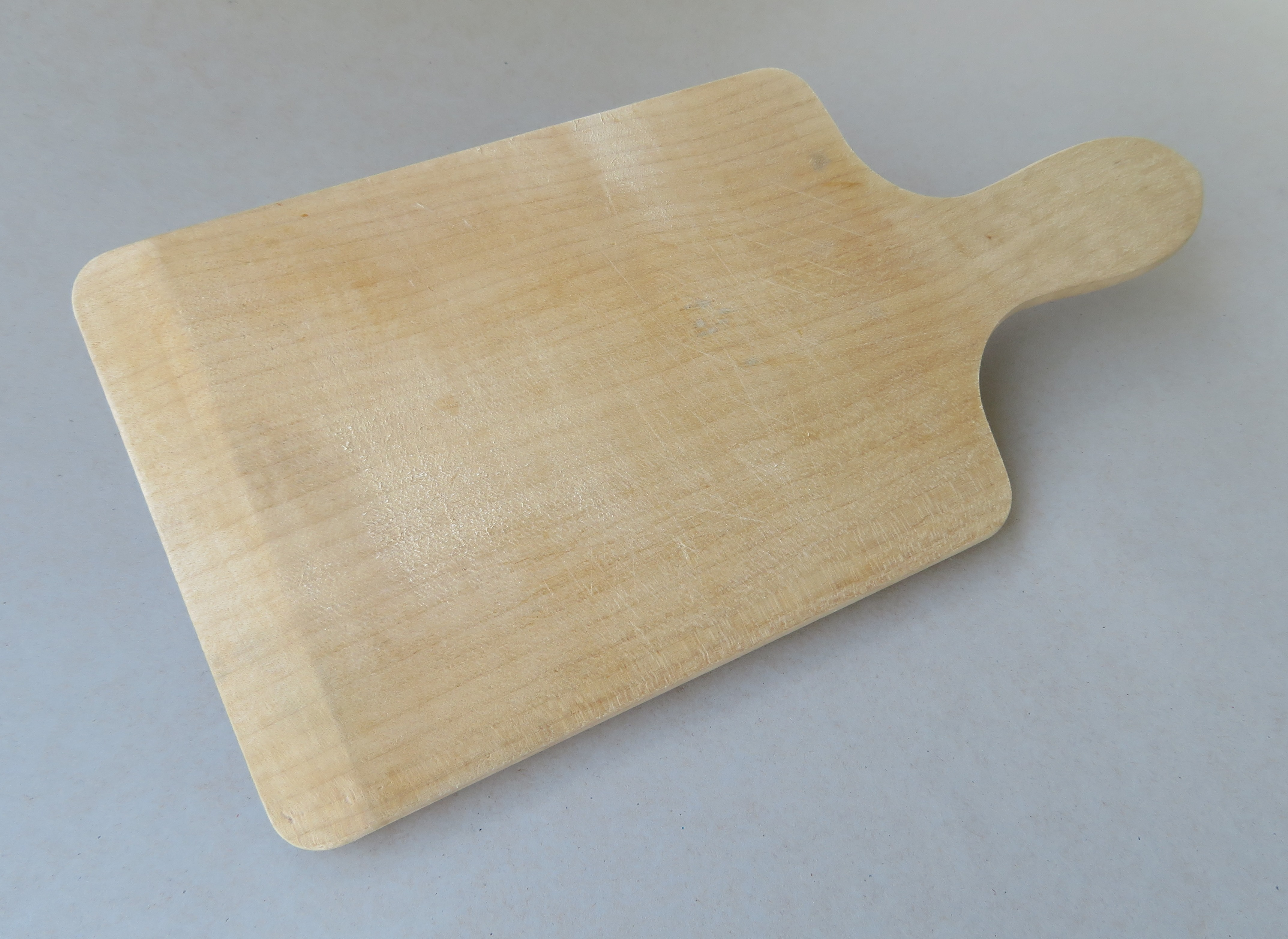 Spätzlesbrett mit Gebrauchsspuren